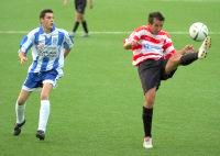 Partido jugado en Alhaurín de la Torre entre el equipo local y el Granada CF